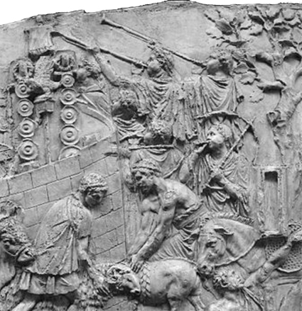 Colonne trajane, joueurs de trompettes (tubicines) et de cor (bucinatores).